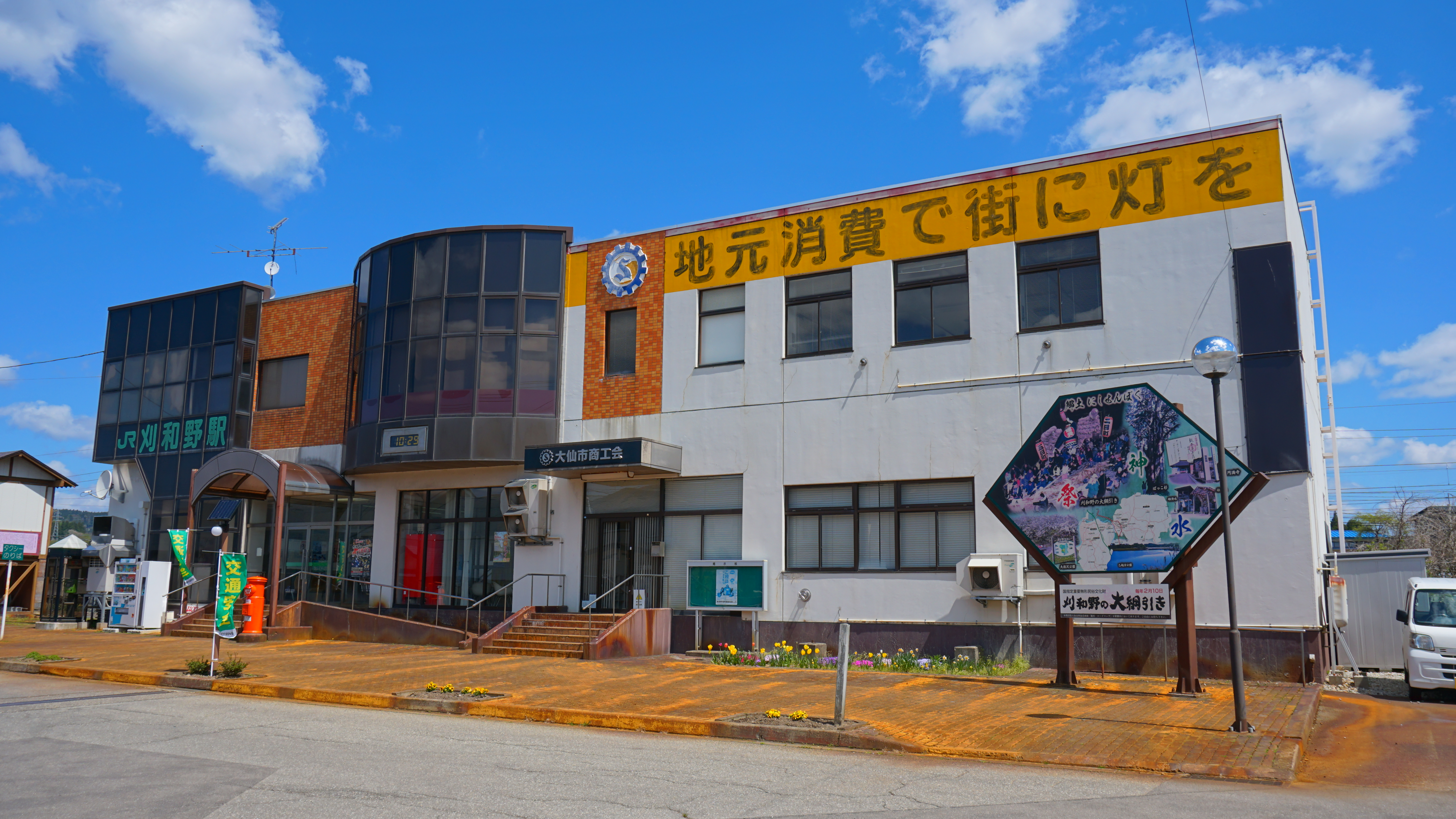 奥羽本線・刈和野駅（秋田県大仙市）